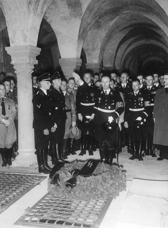 Heinrichs Feier in Quedlinburg Anlässlich des Todestages von König Heinrich I. fand am 1. Juli, wie in den Vorjahren, eine nächtliche Feierstunde statt. UBz: Reichsführer Himmler grüßt in der Heinrichs-Krypta des Doms den grossen König. Hinter dem Reichsführer SS von links SS-Gruppenführer Wolf, Gauleiter und Reichsstatthalter Jordan (halb verdeckt), SS Gruppenführer Heydrich, SS-Obergruppenführer Heissmeyer. Fot.: Ho. 2.7.1938